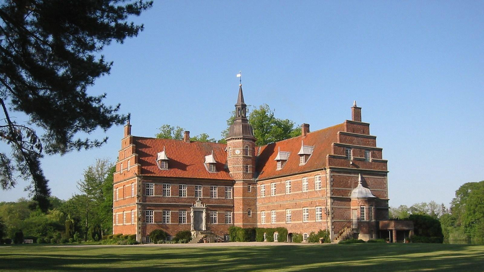 Rønninge Søgård. Hovedbygningen fra 1596